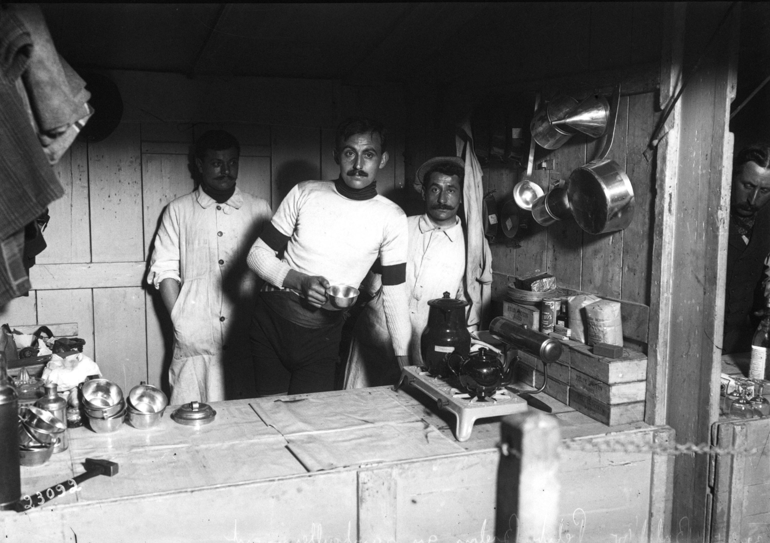 1-9-12, Bol d'or, Petit-Breton au ravitaillement.